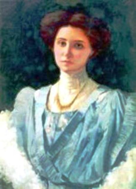 Retrato de Rosa Borja Febres- Cordero de Icaza (Ycaza), escritora, ensayista, dramaturga, socióloga, poetisa, novelista, feminista y activista ecuatoriana. Nacida en Guayaquil (Ecuador), el 30 de julio de 1.889 y fallecida el la misma ciudad el 22 de diciembre de 1.964